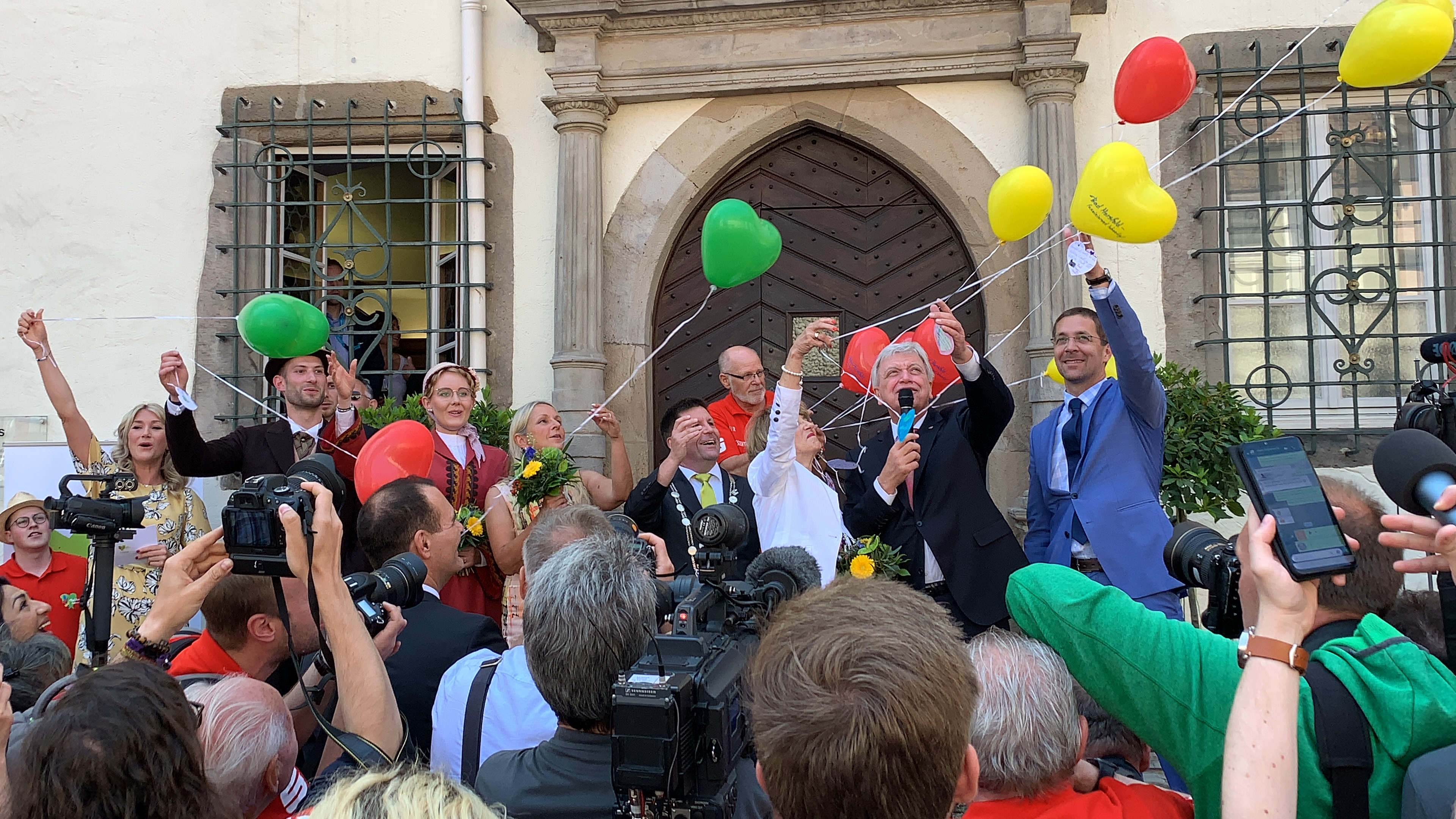 Feierliche Eröffnung des Hessentags 2019 vor dem Rathaus in Bad Hersfeld mit dem Hessentagspaar, Bürgermeister Thomas Fehling und Frau, Ministerpräsident Volker Bouffier und Frau sowie Landrat Dr. Koch.